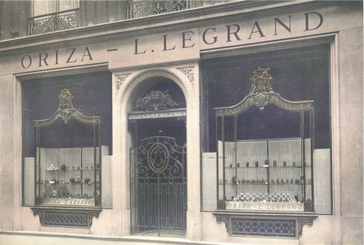 Salon de Vente du parfumeur Oriza - L. Legrand, 9 boulevard de La Madeleine, Paris.